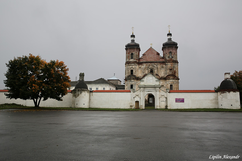 Юравіцкі кляштар езуітаў